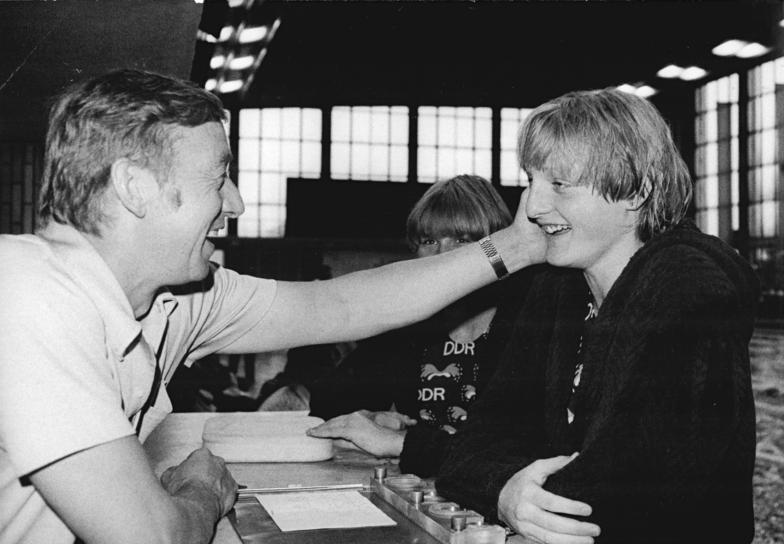 Birgit Meinecke ADN-ZB Mittelstädt 1.7.81 Berlin: 32. DDR-Meisterschaften im Sportschwimmen (1. Tag)- Trainer Rolf Gläser und sein Schützling Birgit Meinecke (SC Dynamo Berlin), die am 4.7. 1981 ihren 17. Geburtstag während der titelkämpfe feiert, sind offensichtlich sehr zufrieden. Als Vorlaufschnellste über 100 m Freistil (56,32 s) machen sich beide berechtigre Medaillenhoffungen. (Siehe Ergebnisse in ADN-Meldung!)